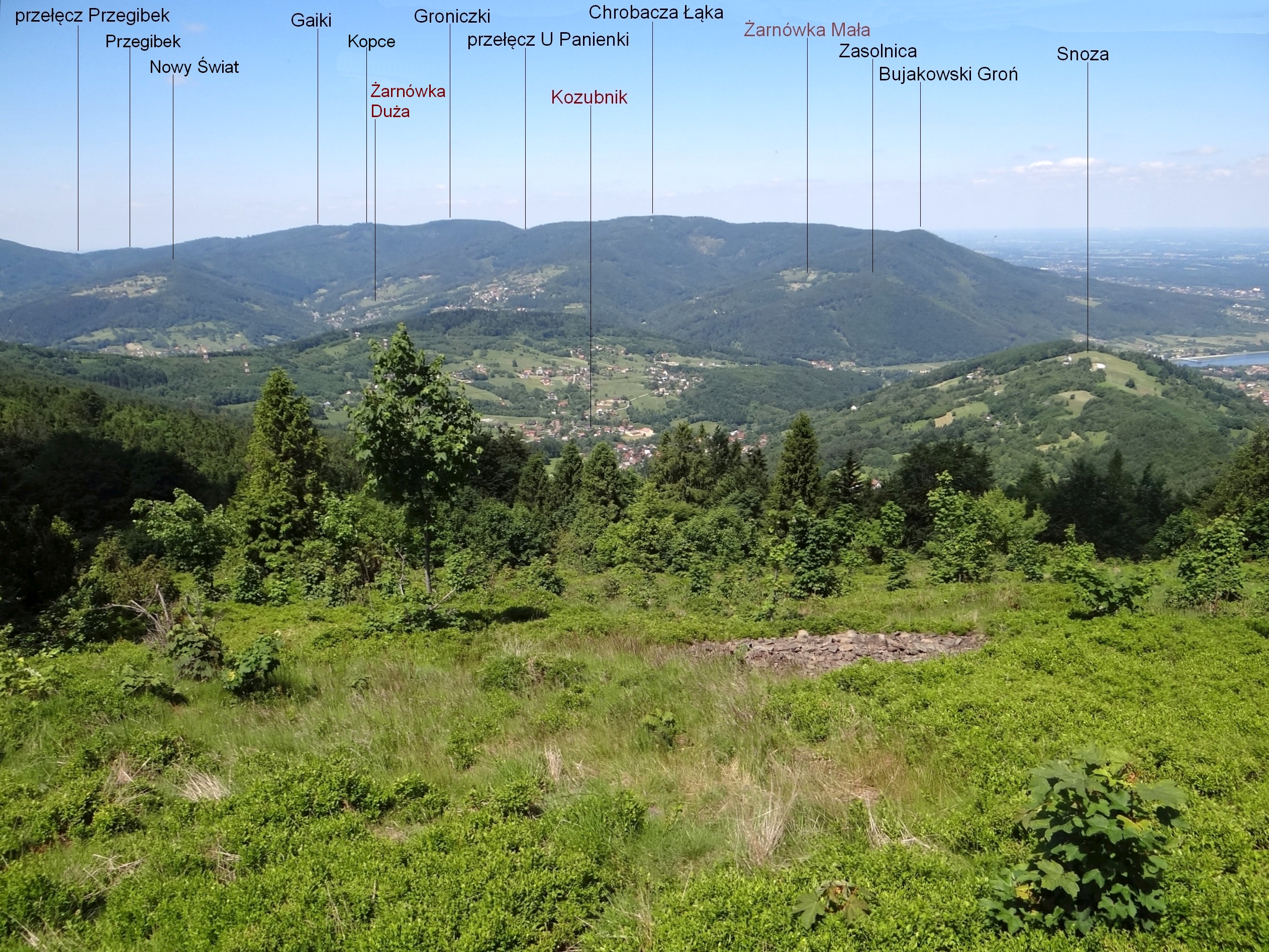 Widok spod szczytu Kiczery